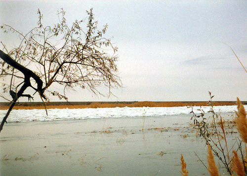 Байконур, р. Сырдарья, предзимье, конец 1990-х гг.